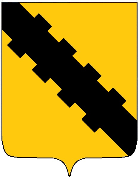 Stemma della famiglia Morozzo